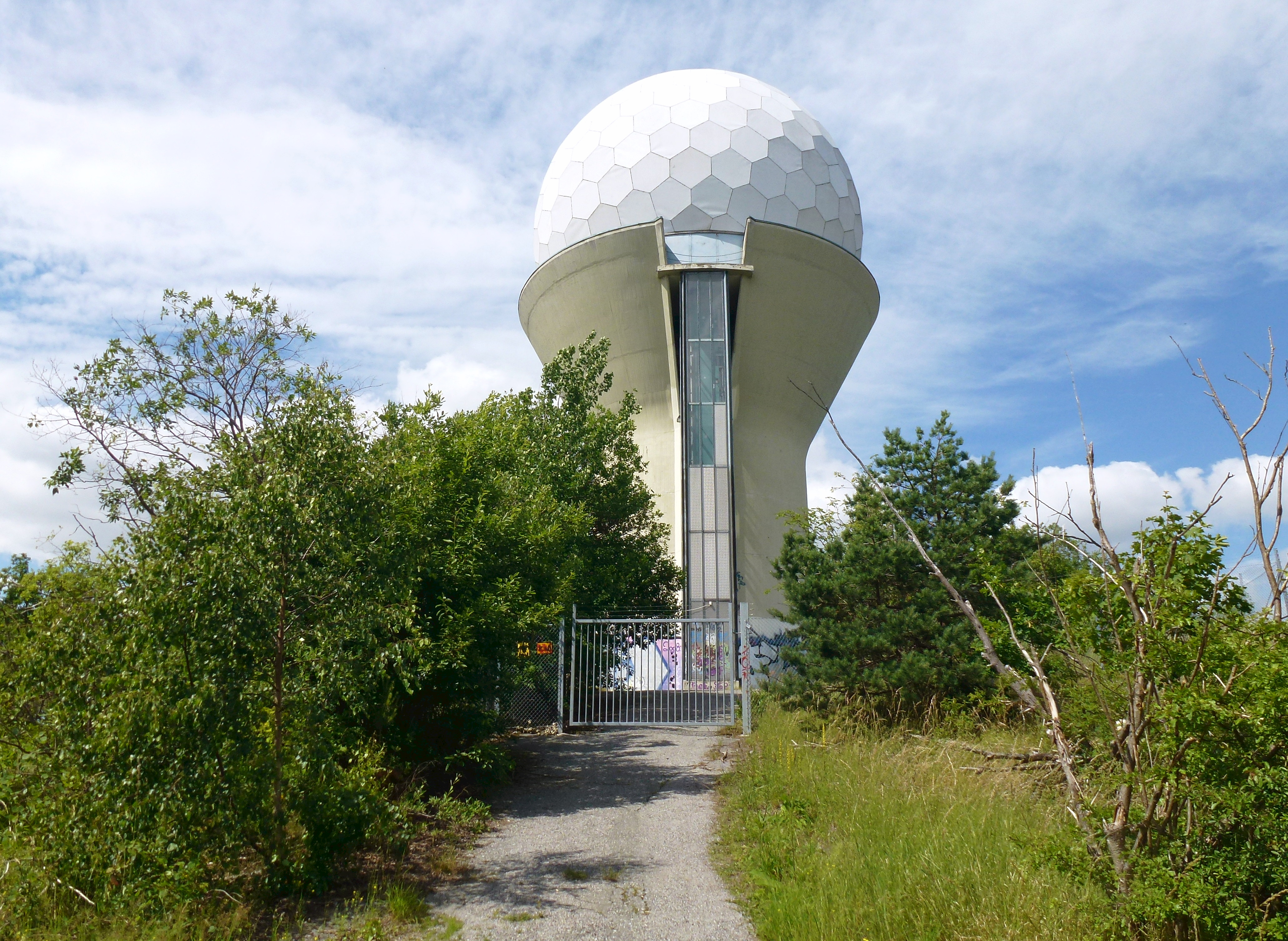 Bällsta radartorn kallad "Golfbollen"